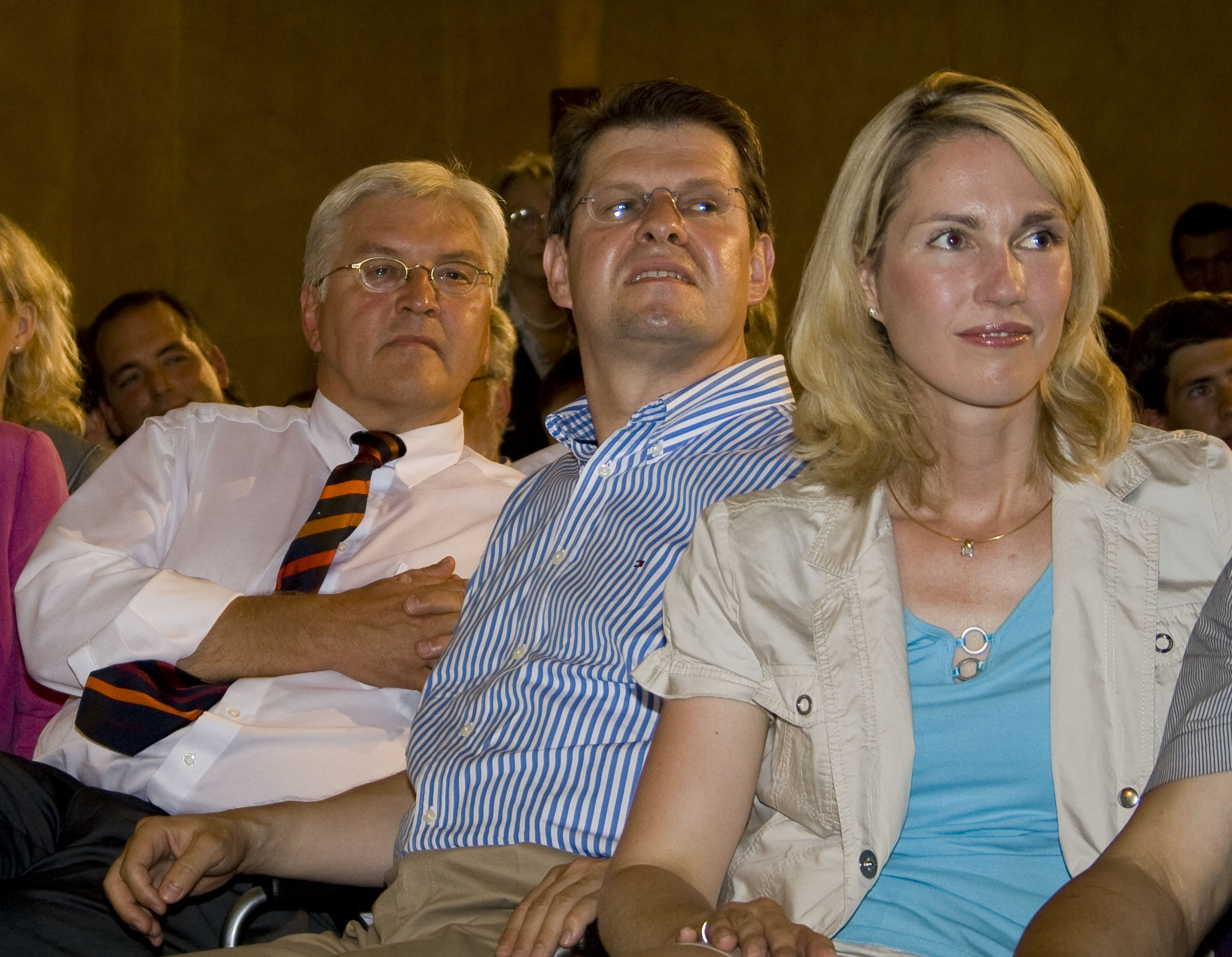 Manuela Schwesig zusammen mit Ralf Stegner und Frank-Walter Steinmeier (v.r.n.l) bei der Veranstaltung „Gemeinsam für einen neuen Bildungsaufbruch - Gleiche Chancen durch Bildung und Integration“ am 20.08.2009 im Legienhof in Kiel.